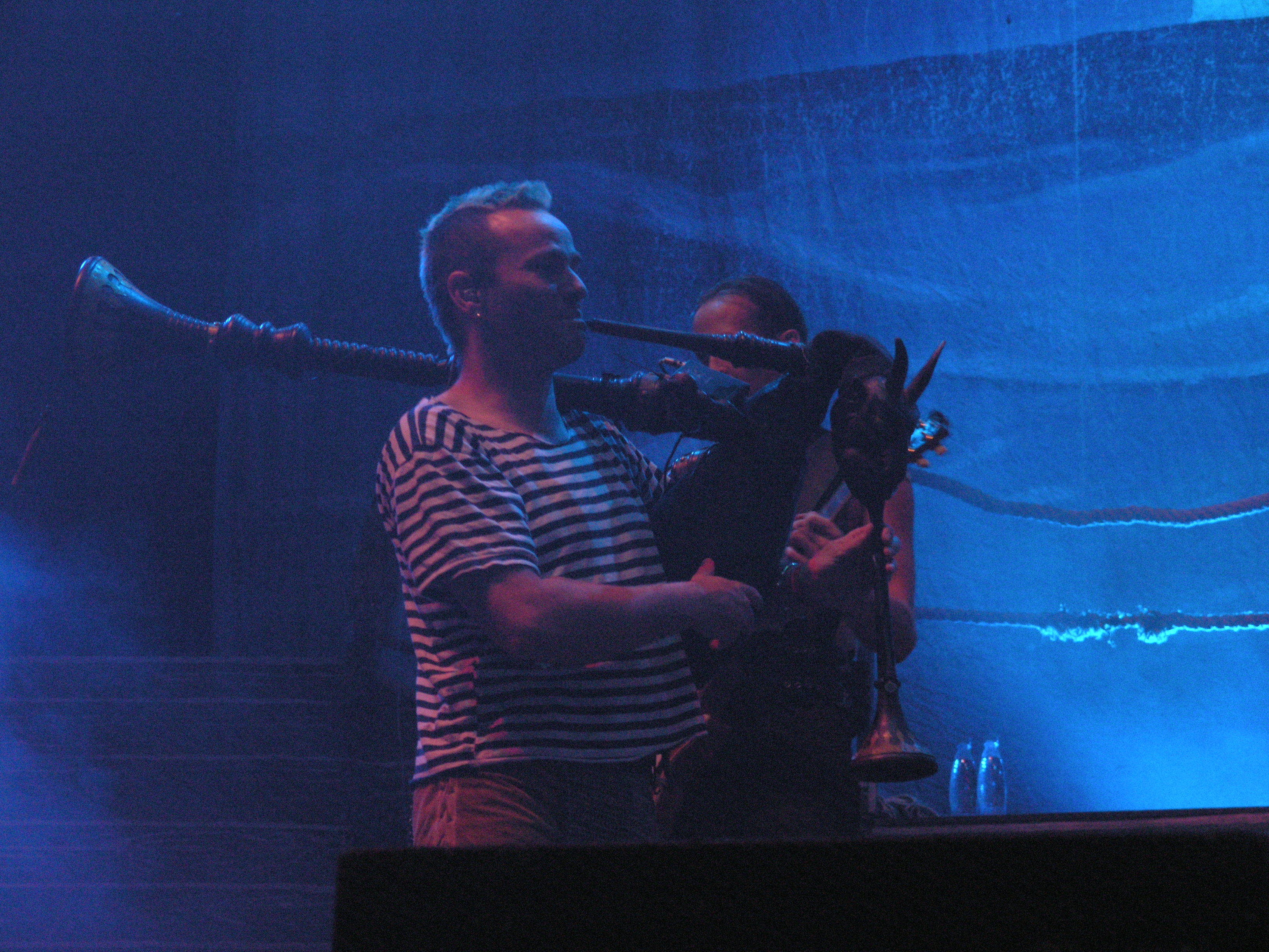 Zespół In Extremo w czasie festiwalu Masters of Rock 2007